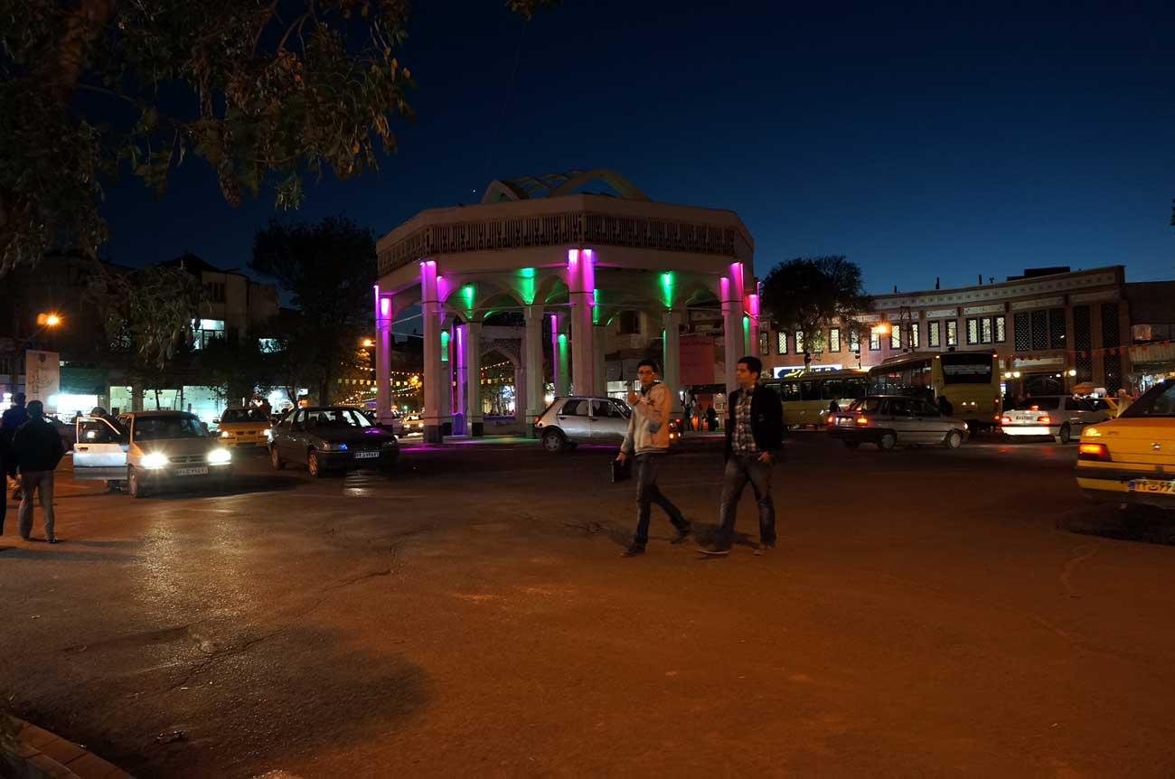 Ardabil, Iran 2013